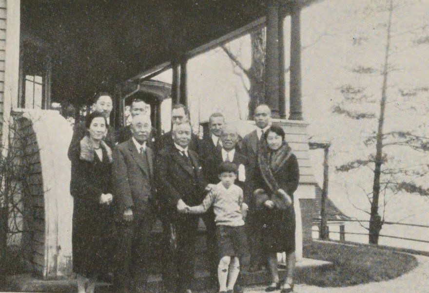 新井領一郎のコネチカットリバーサイドの別荘 隣は部下の村井保固の別荘